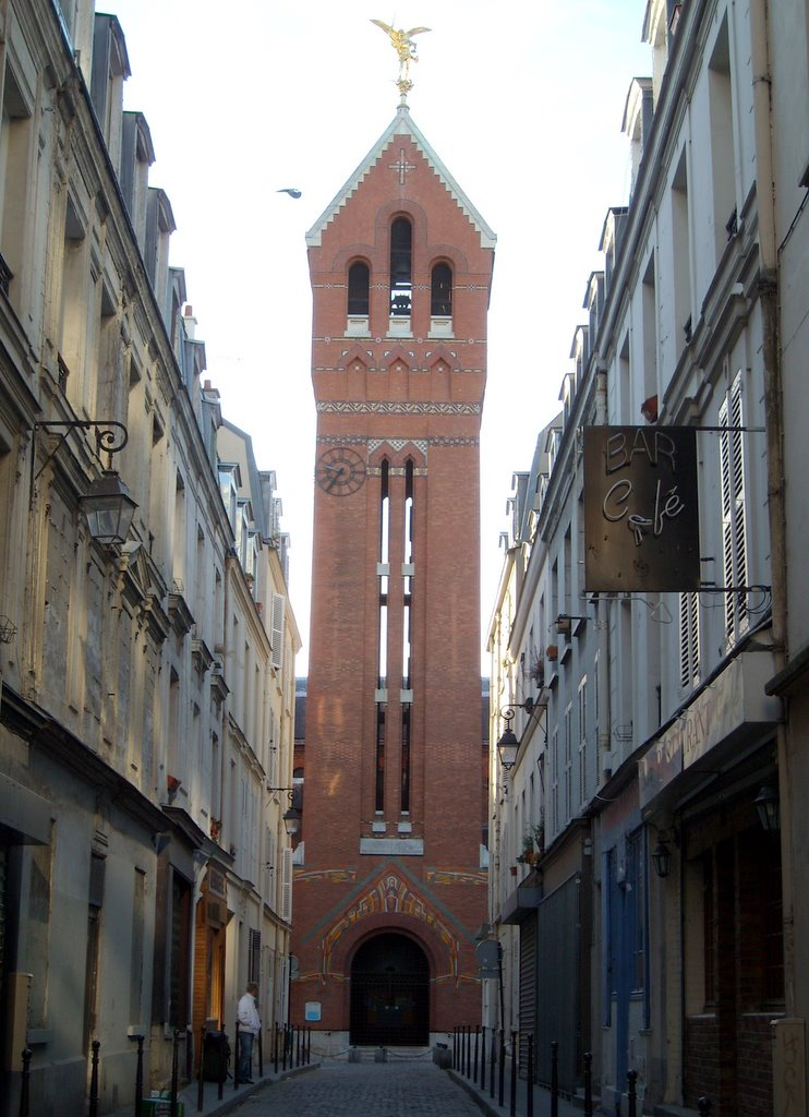 Porche d'entrée et clocher avec l'archange de l'église Saint-Michel-des-Batignolles